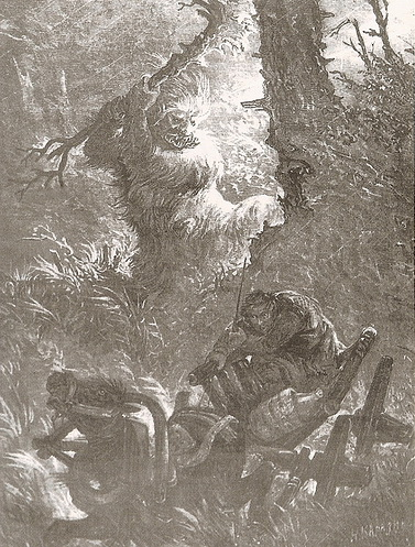 И. И. Ижакевич. Леший. Рисунок из журнала "Нива". 1904 г. № 22.)